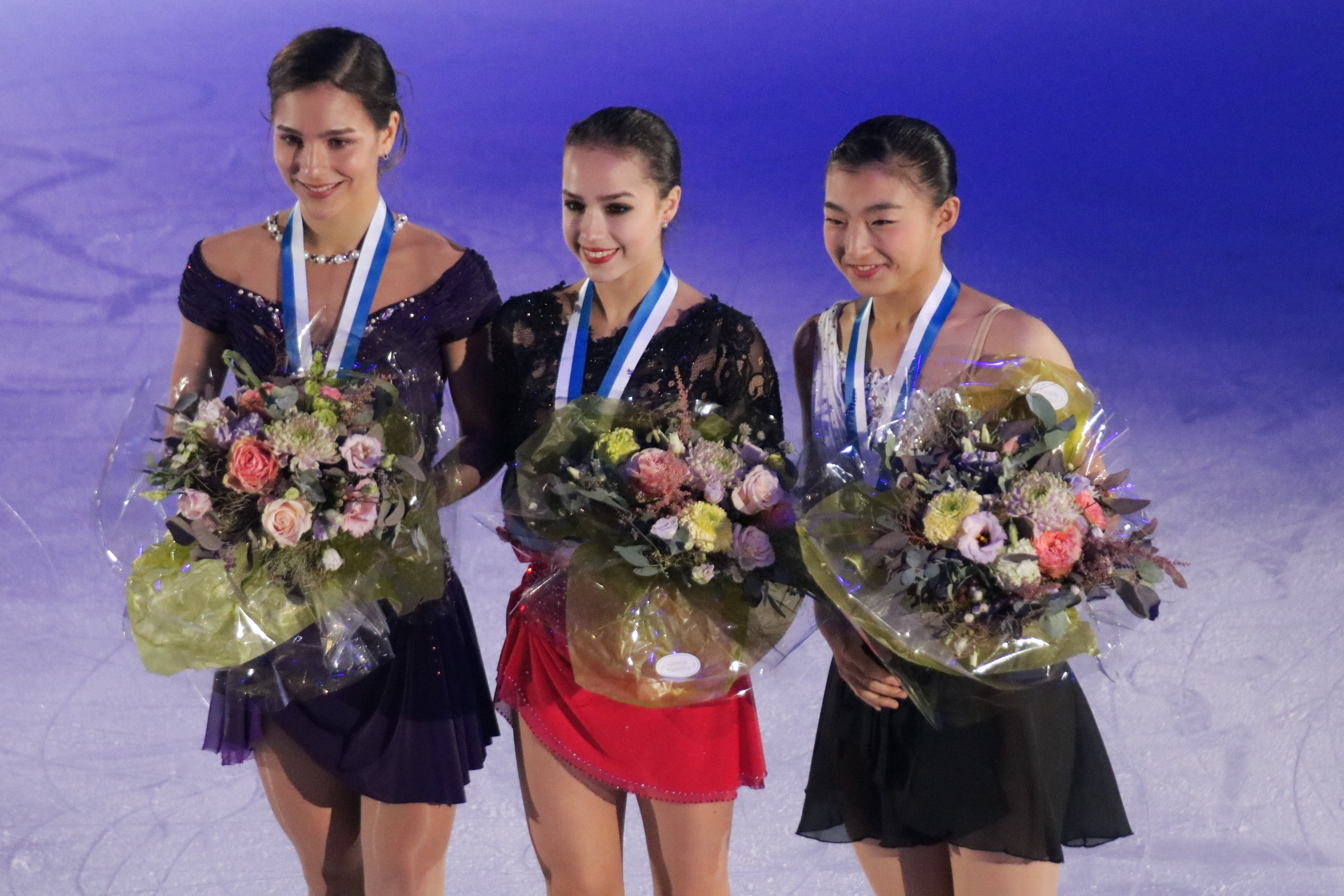 Церемония награждения в женском одиночном катании на Гран-при Хельсинки 2018.